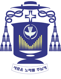 이기헌 베드로 주교 문장